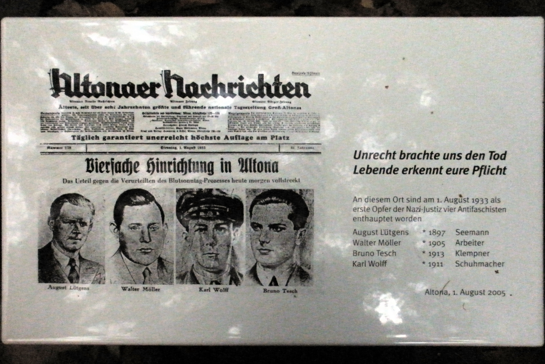 Gedenktafel hinter dem Amtsgericht Altona (Hamburg) an die vier Hingerichteten nach dem Altonaer Blutsonntag Prozess - Bruno Tesch - August Lütgens - Karl Wolff - Walter Möller